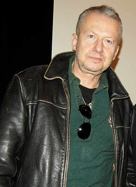 Bogusław "Bogie" Linda.